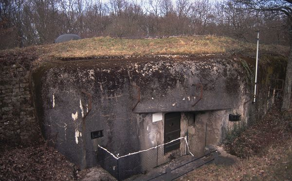 Maginot Line - Observatoire de Boust